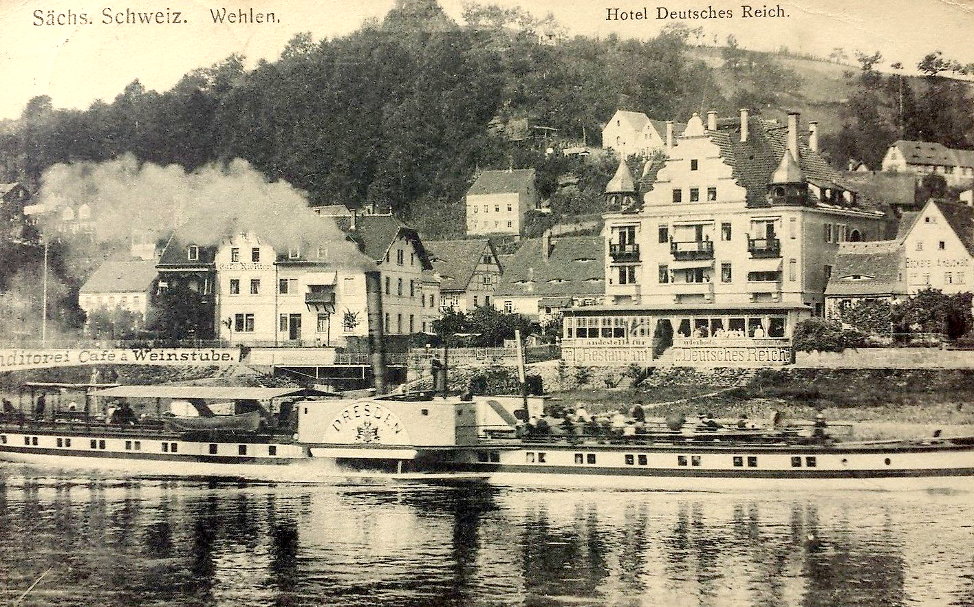 Dampfschiff Dresden